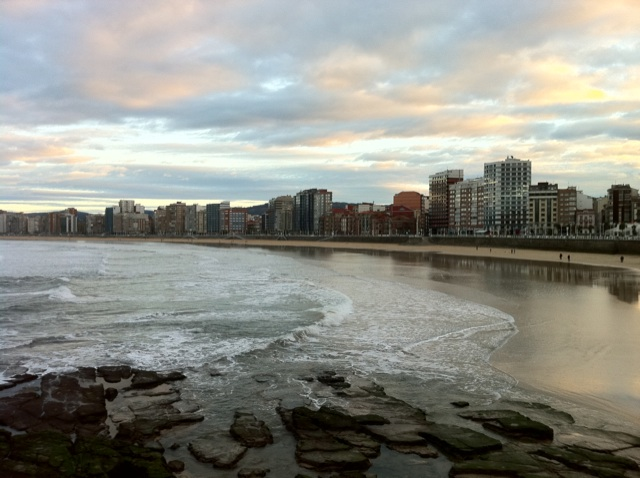 Gijon